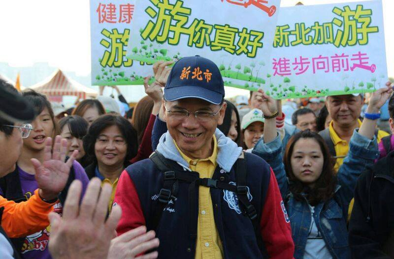 游錫堃參選新北市長後援會